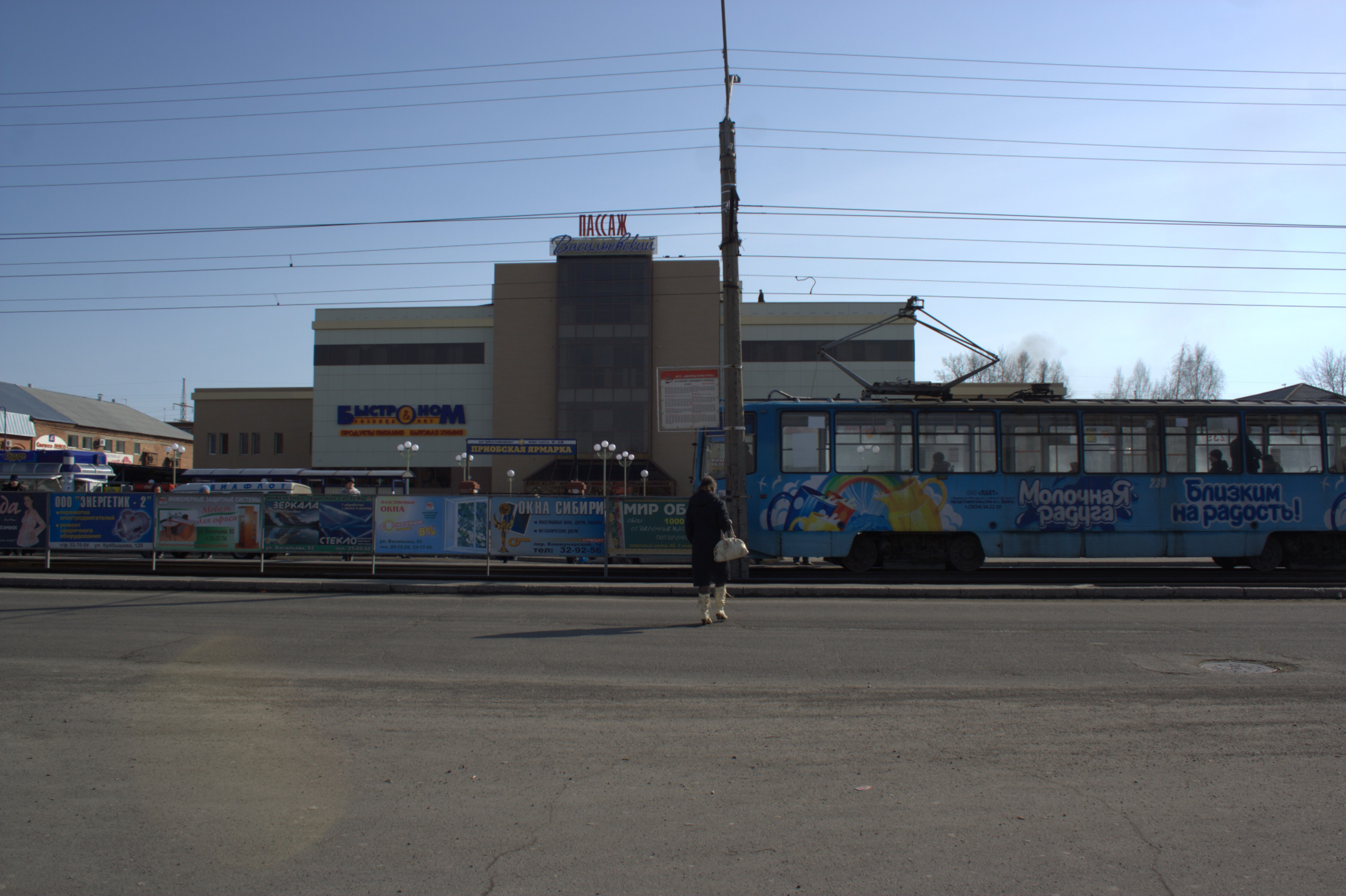 Трамвай на улице Васильева (Бийск)